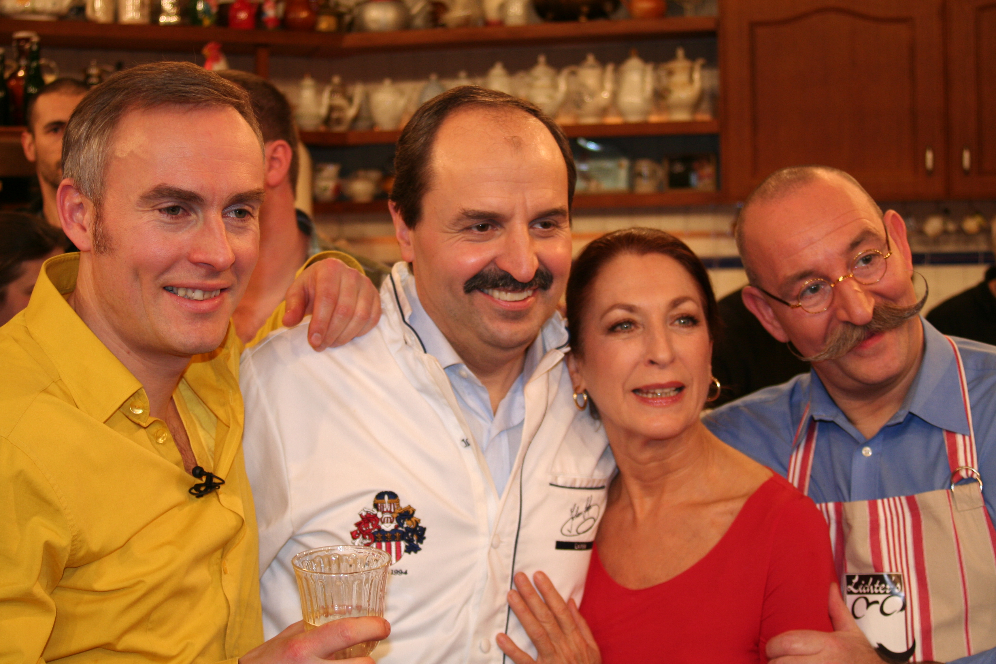 Johann König, Horst Lichter, Johann Lafer, Daniela Ziegler bei der Fernsehaufzeichnung zur Sendung:Lafer!Lichter!Lecker!